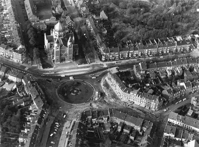 Luchtfoto van de omgeving Koningin Emmaplein in Maastricht tijdens wegwerkzaamheden in 1963. Fotocollectie RHCL Maastricht, GAM 13276.